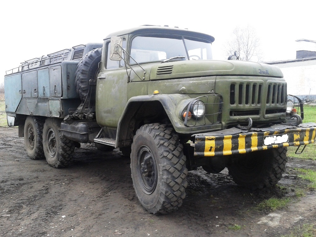 УПГ-300.